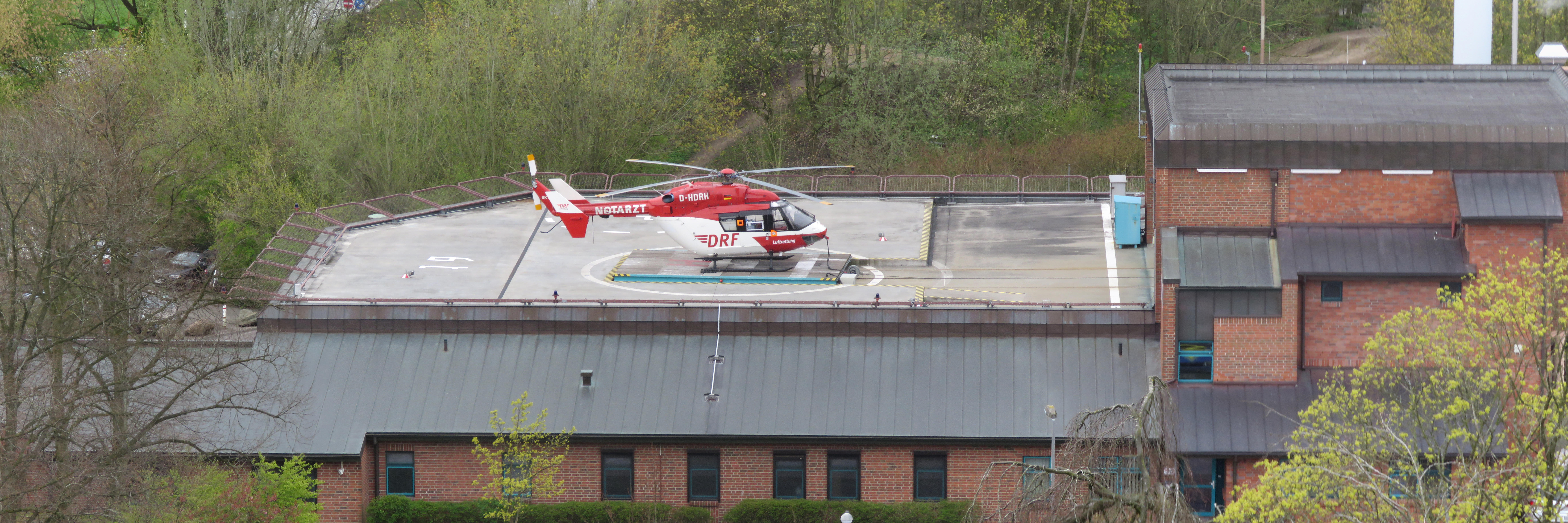 DRF Luftrettungshubschrauber Typs BK 117 D-HDRH auf dem Landeplatz Rendsburg Imland Klinik